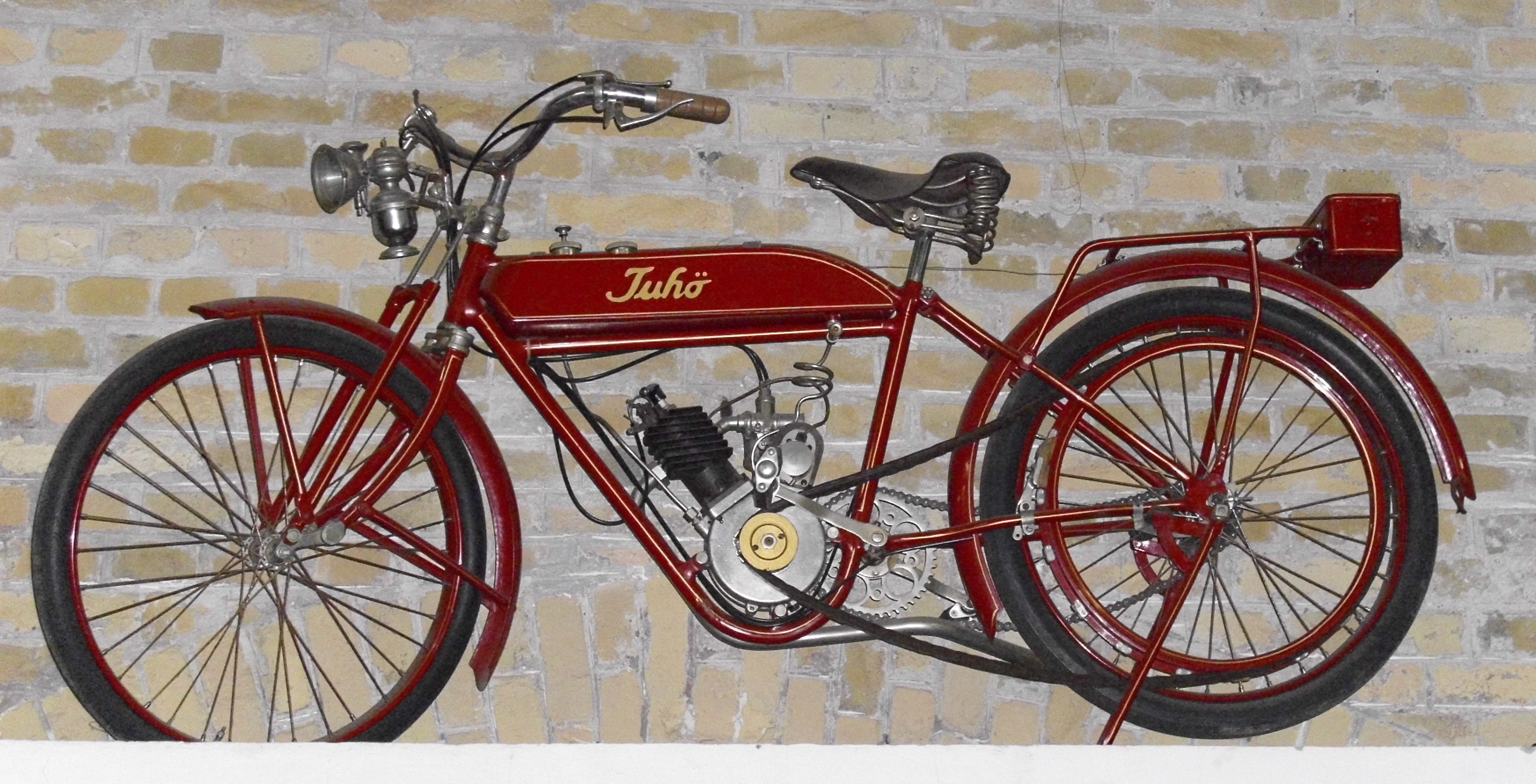 Juhö Motorrad im Transportmuseum von Bratislava